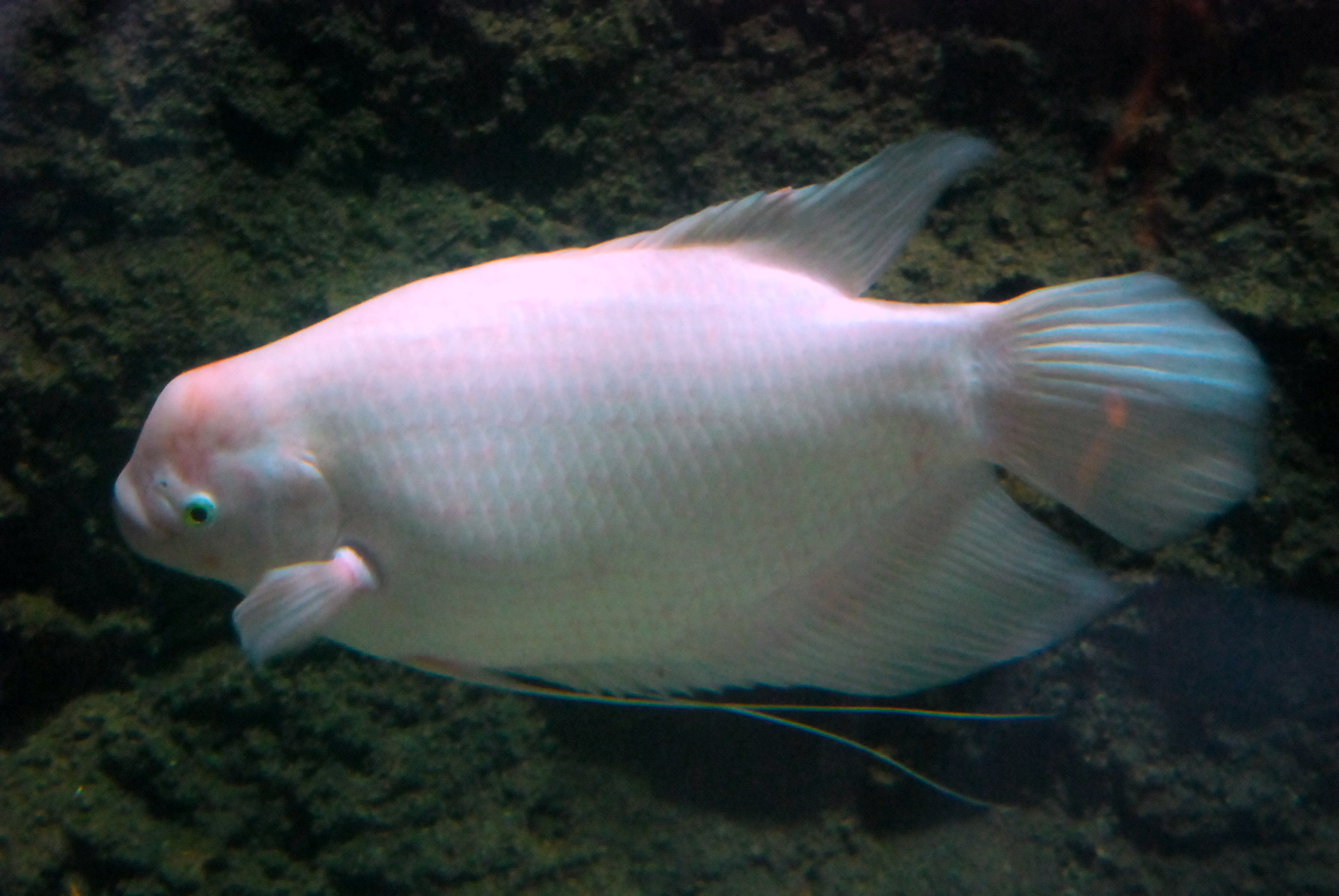 金帆船，于北京海洋馆